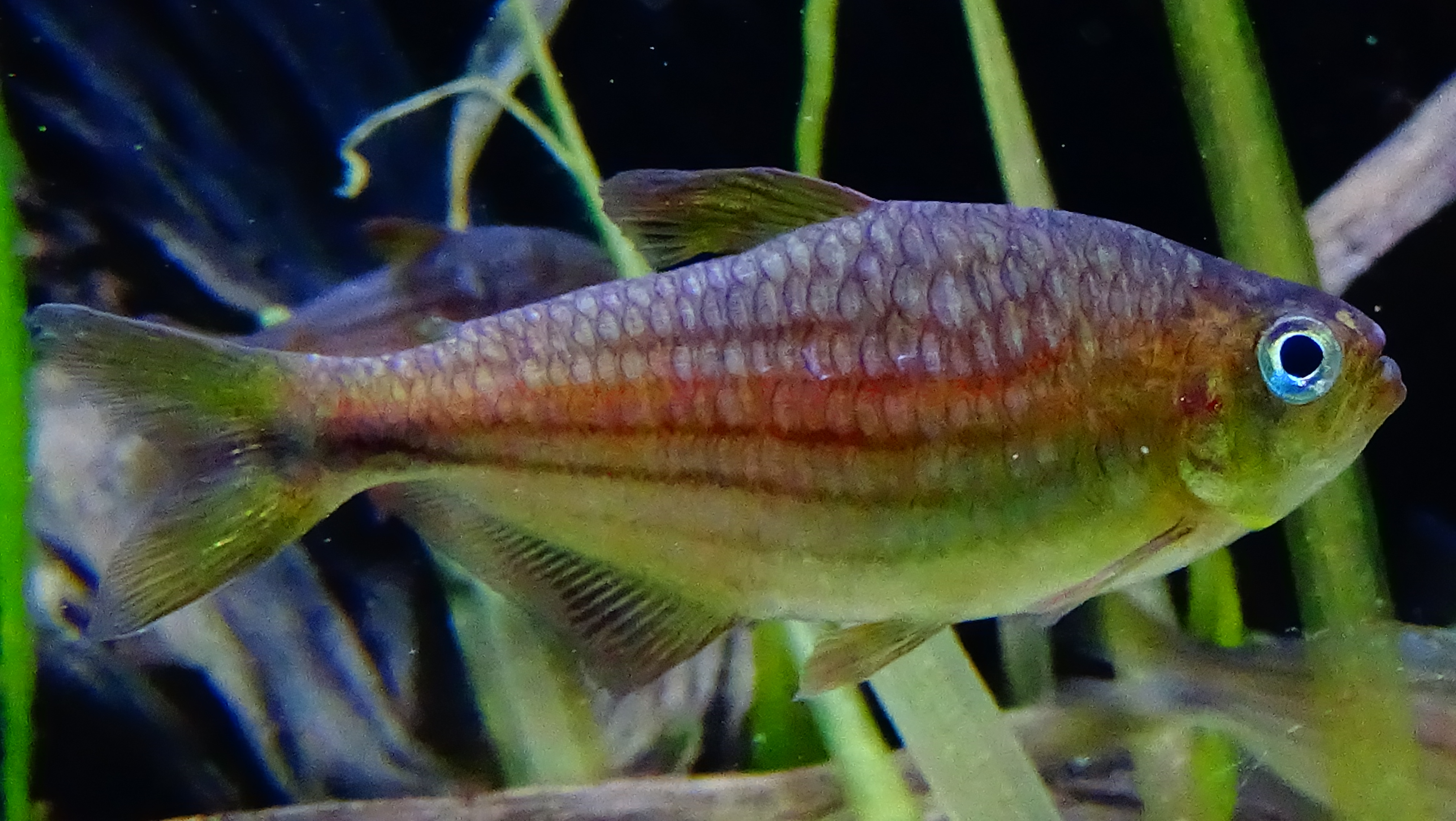 Moenkhausia agnesae - Aquarium Tropicale du Palais de la Portes Dorée - 07/2015